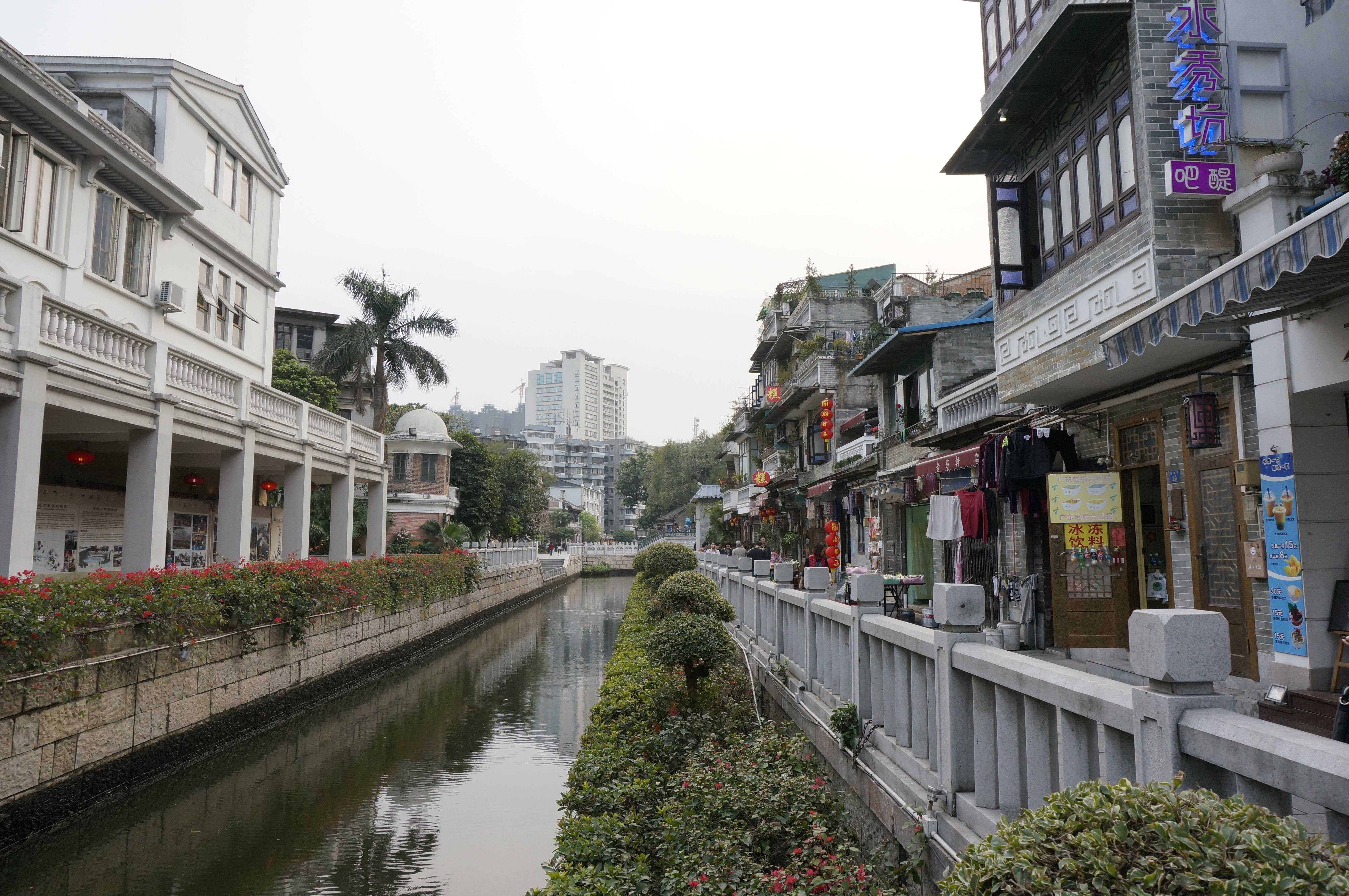 中文（中国大陆）: 摄于广州荔湾湖